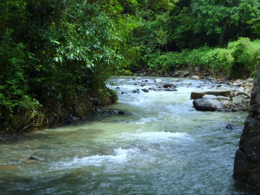 Arroyo escribanillo ubicado en el Municipio de Chontla, Veracruz